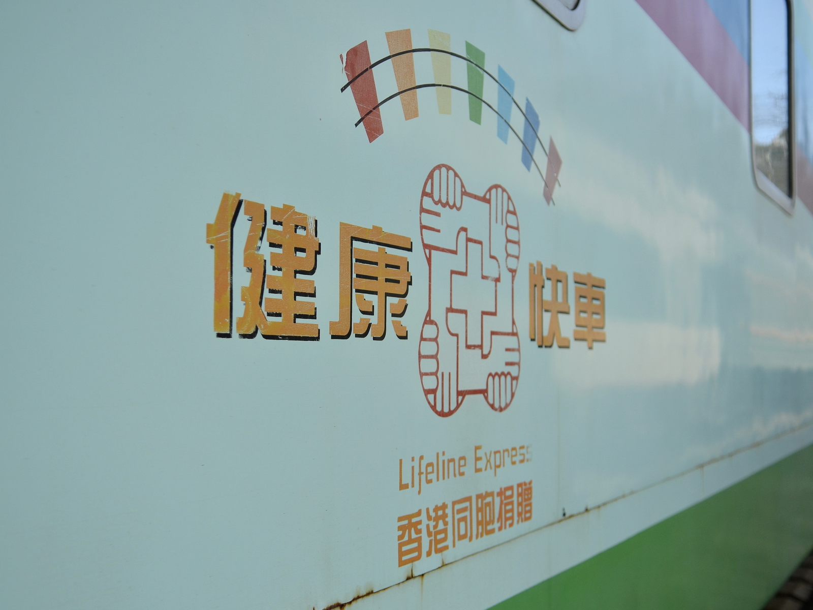 健康快车（Lifeline Express）的车身标记